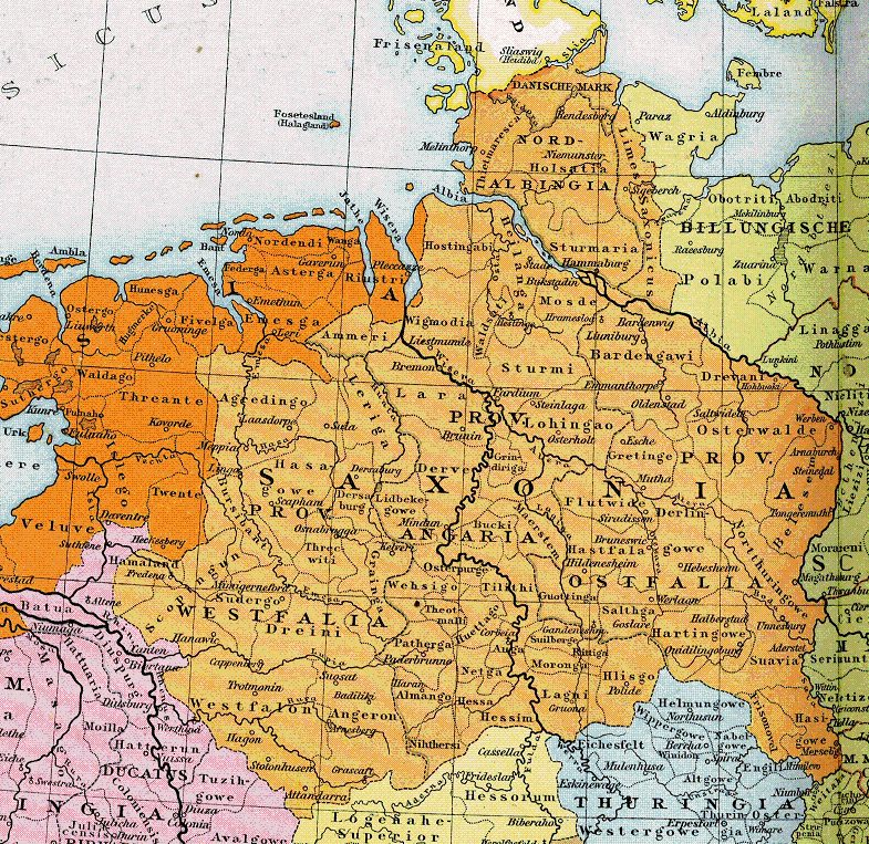 Heiliges Römisches Reich um 1000, Herzogtum Sachsen